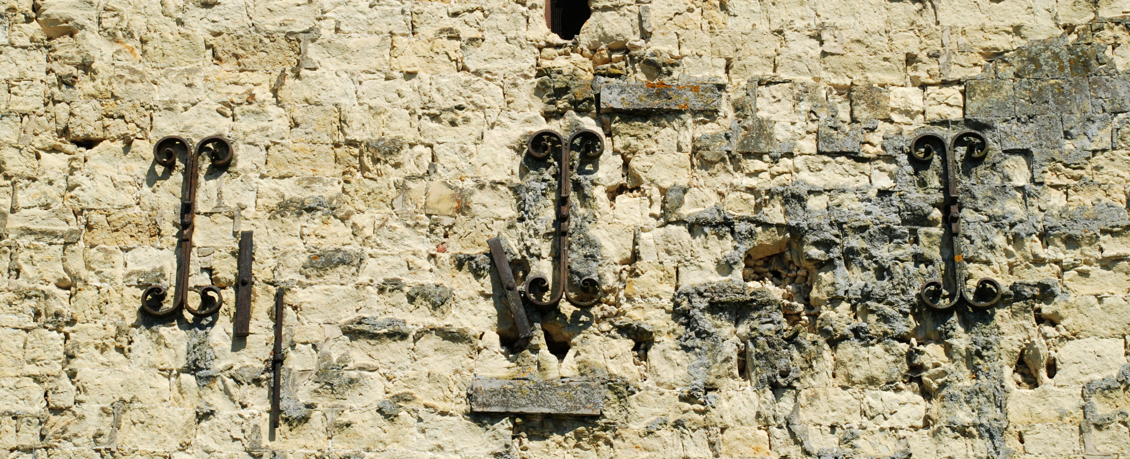 Belgique - Brabant wallon - Hélécine - Neerheylissem - Eglise Saint-Sulpice